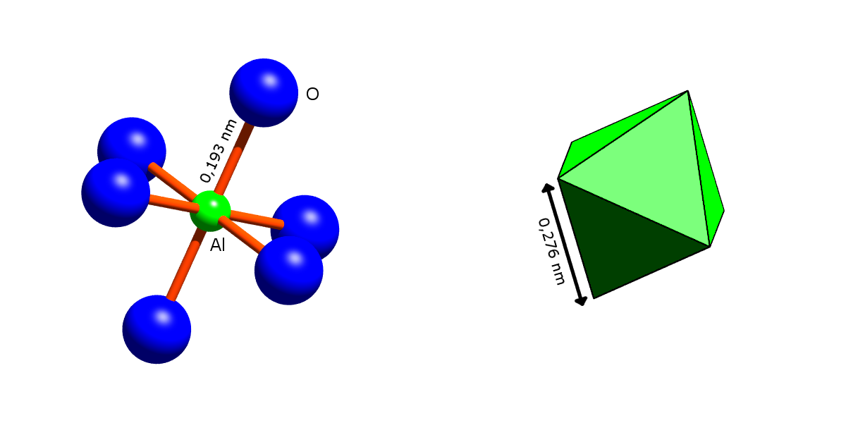 Granatstruktur: AlO6-Oktaeder basierend auf Strukturdaten von synthetischen Grossular bei Raumtemperatur